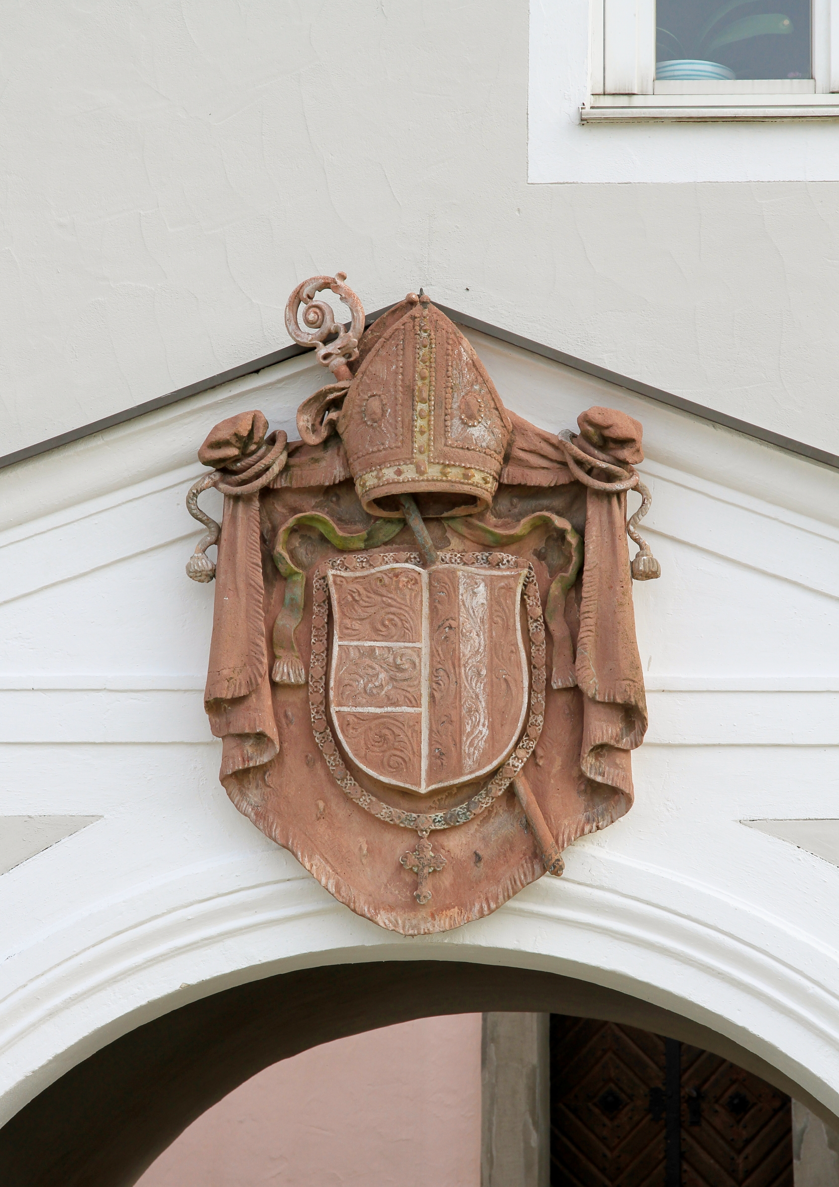 Wappenstein des Dompropstes und Bischofes Anton Kautschitz über dem Portal des sogenannten Schloss Kirnberg (Dechantei der Dompropstei St. Stephan) in der niederösterreichischen Gemeinde Kirnberg an der Mank.